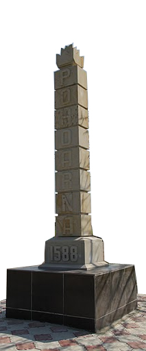 Pohoarna